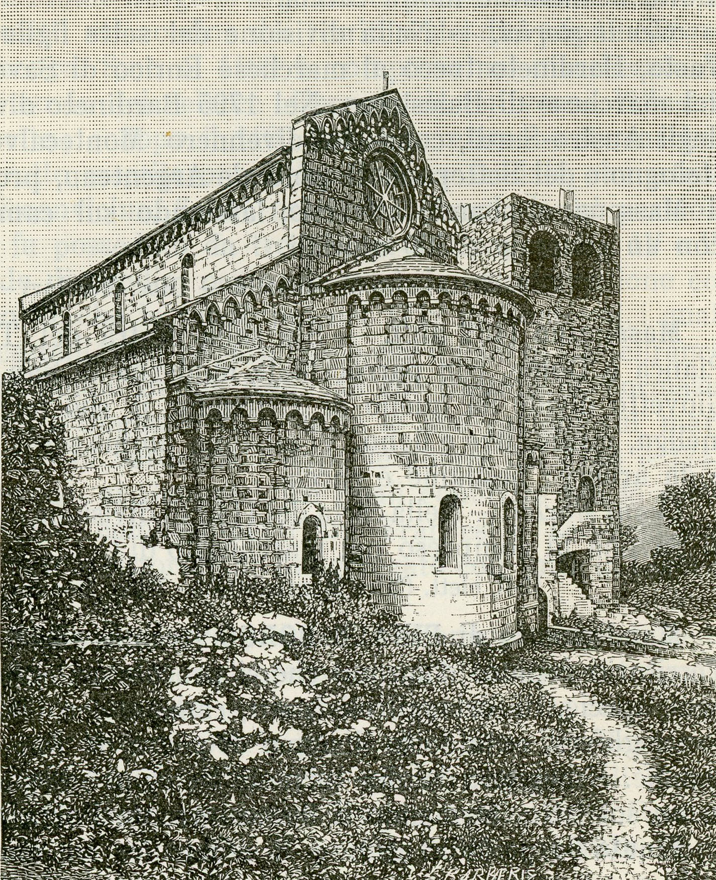 Andora: abside della chiesa dei Santi Giacomo e Filippo (xilografia).